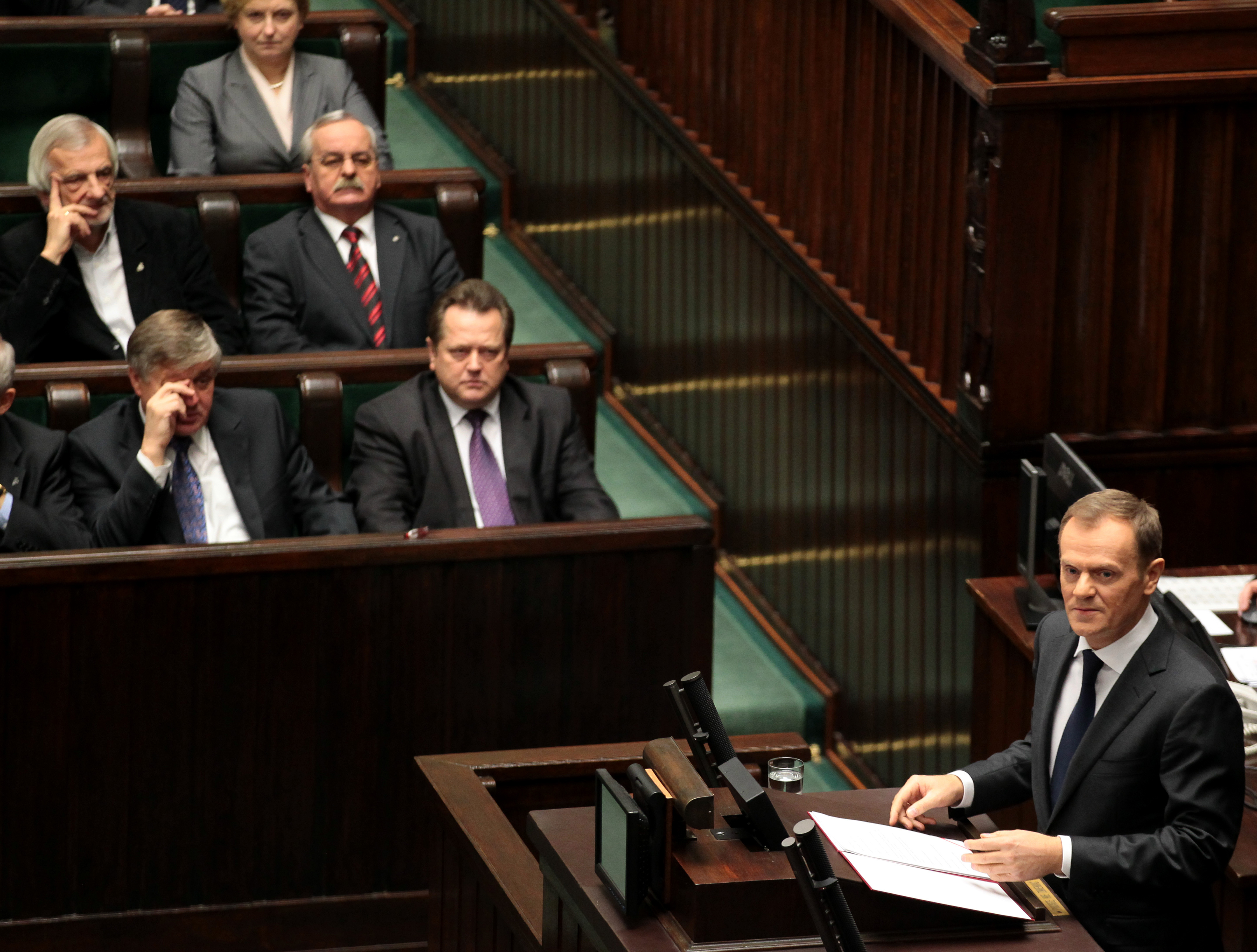 18.11.2011, Premier Donald Tusk wygłosił w Sejmie expose.